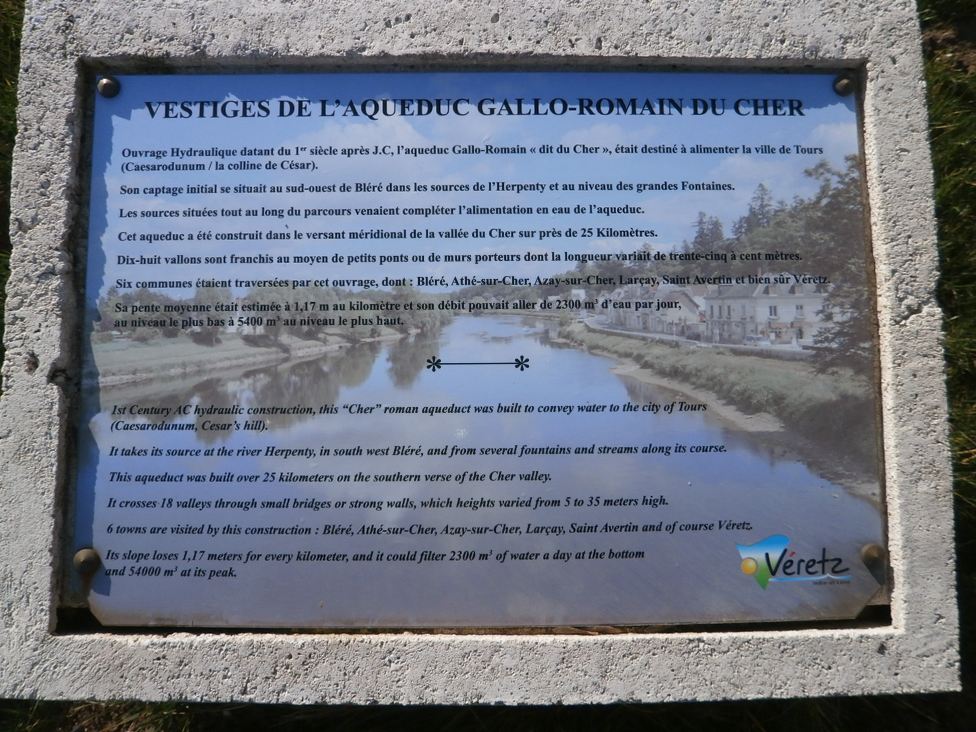 Plaque explicative apposée à proximité des vestiges exposés de l'aqueduc à Véretz